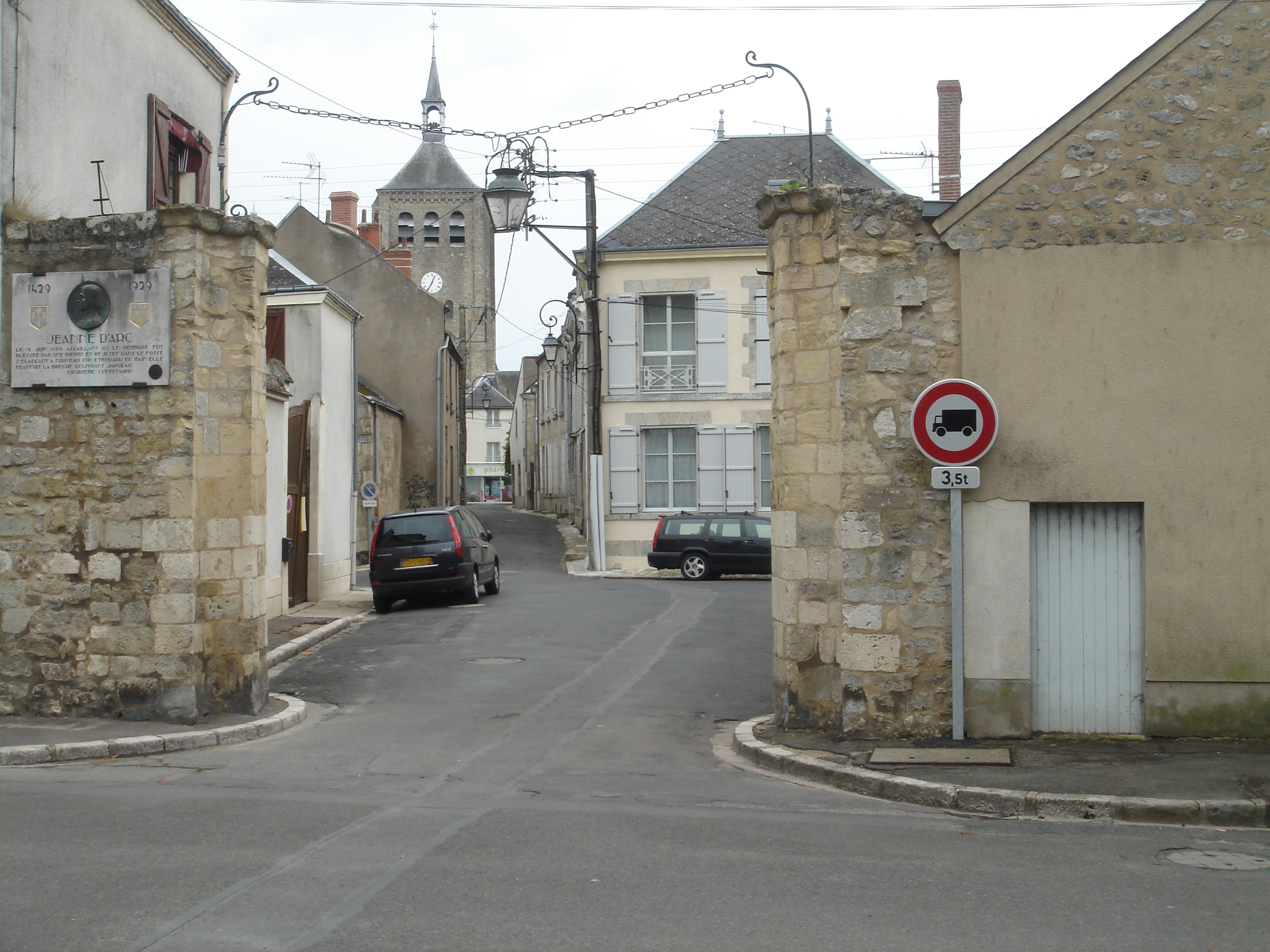 La Porte-Madeleine à Jargeau (Loiret) ; sur la porte à gauche : plaque commémorative, à la gloire de Jeanne d'Arc, du 500è anniversaire de la Bataille de Jargeau (1429) ; au fond : l'église Saint-Êtienne.